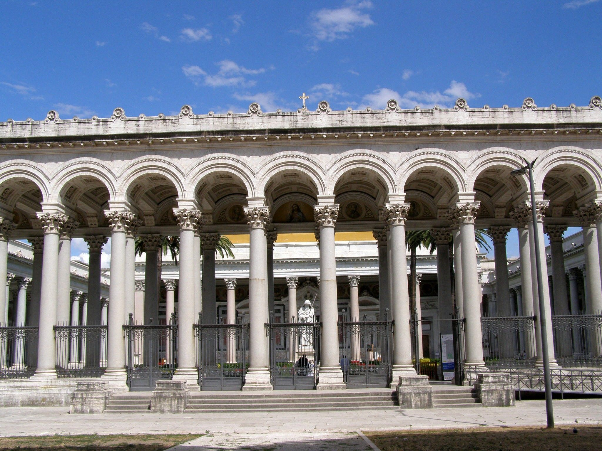 Západné ohraničenie átria baziliky tvoria tri rady korintských stĺpov